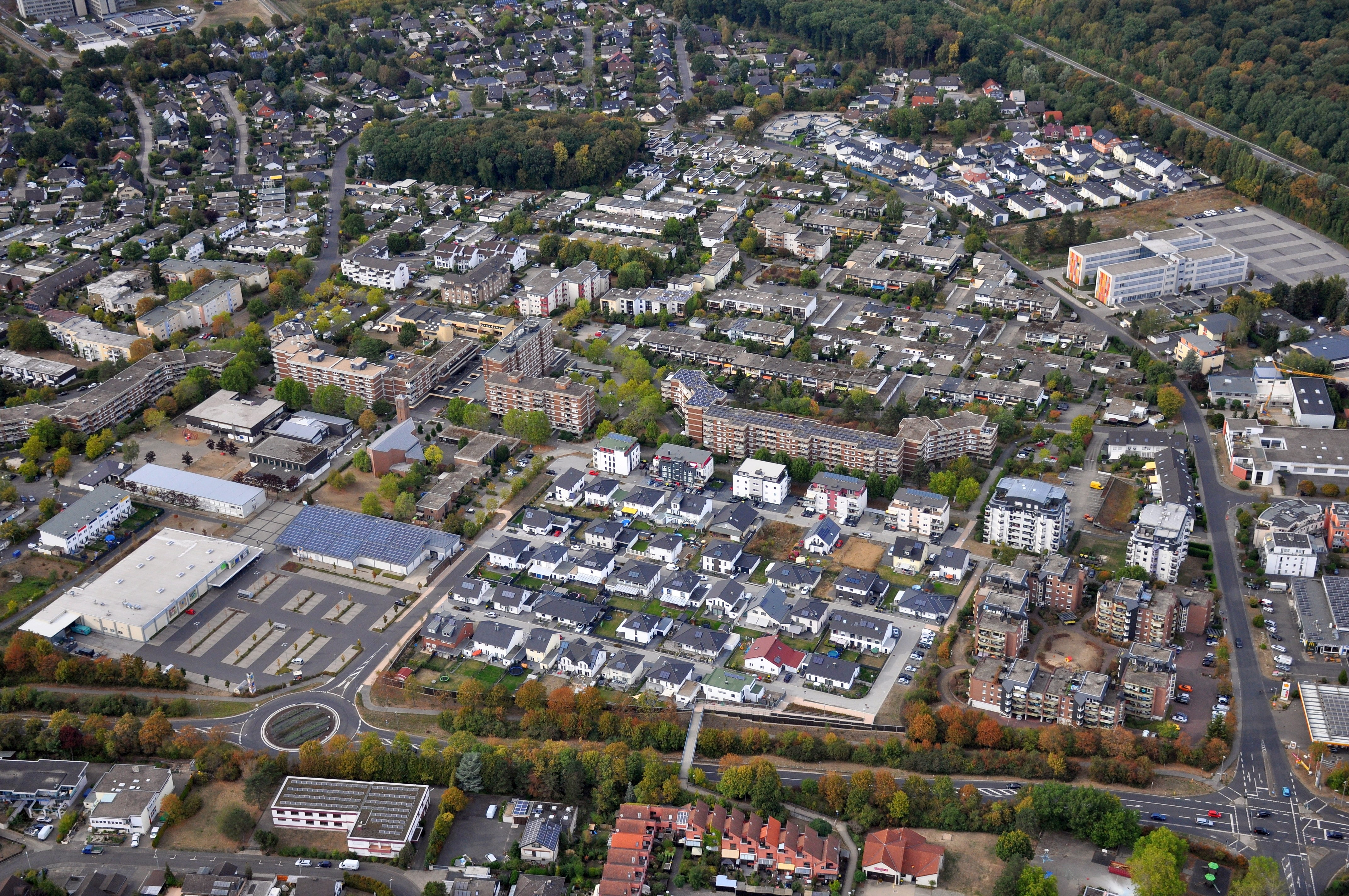 Merl / Steinbüchel 2018 nach Bebauung der Sportflächen, Luftbild aus südöstlicher Richtung